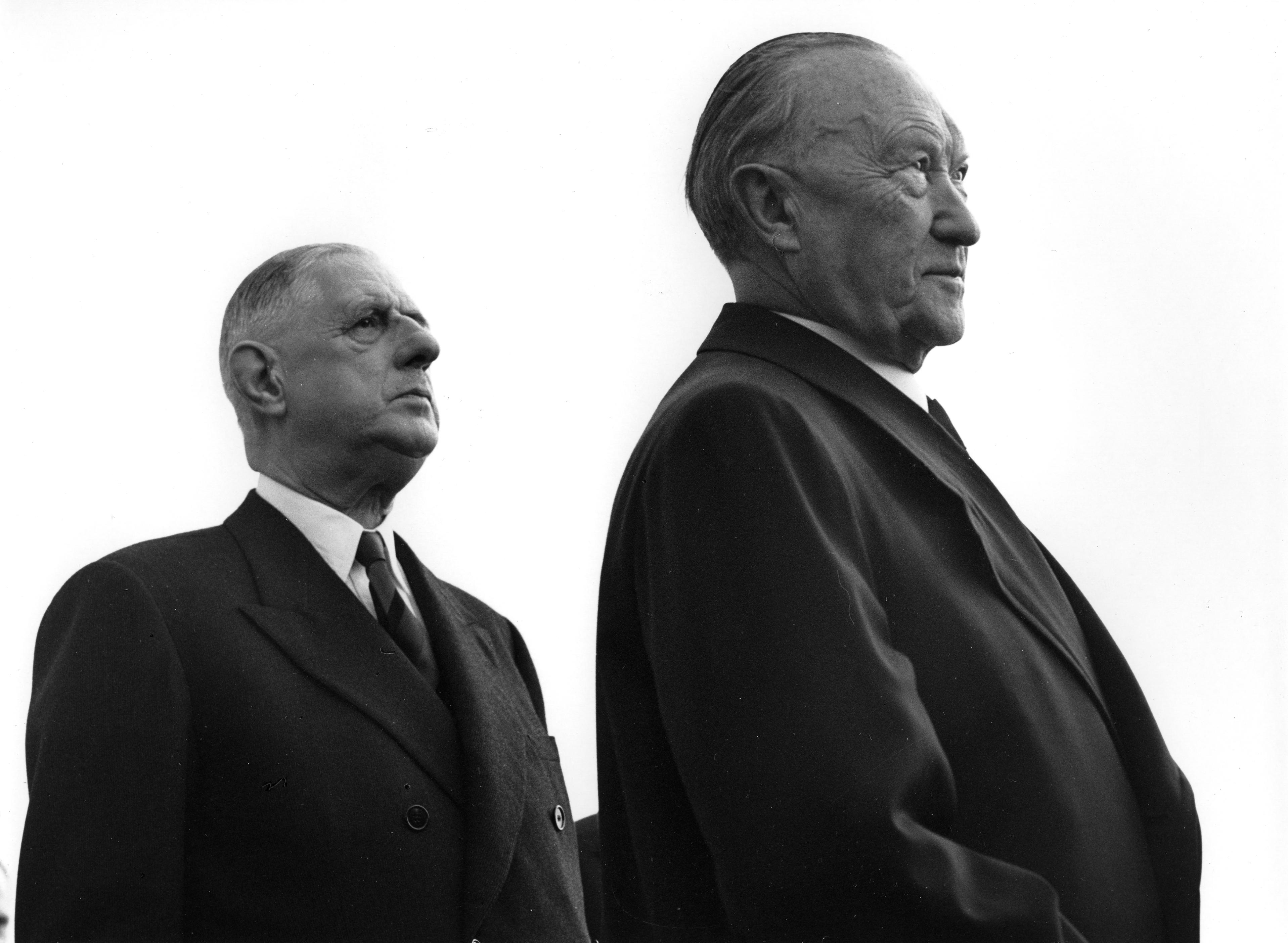 Staatsbesuch Charles de Gaulle Ankunft auf dem Flugplatz Wahn